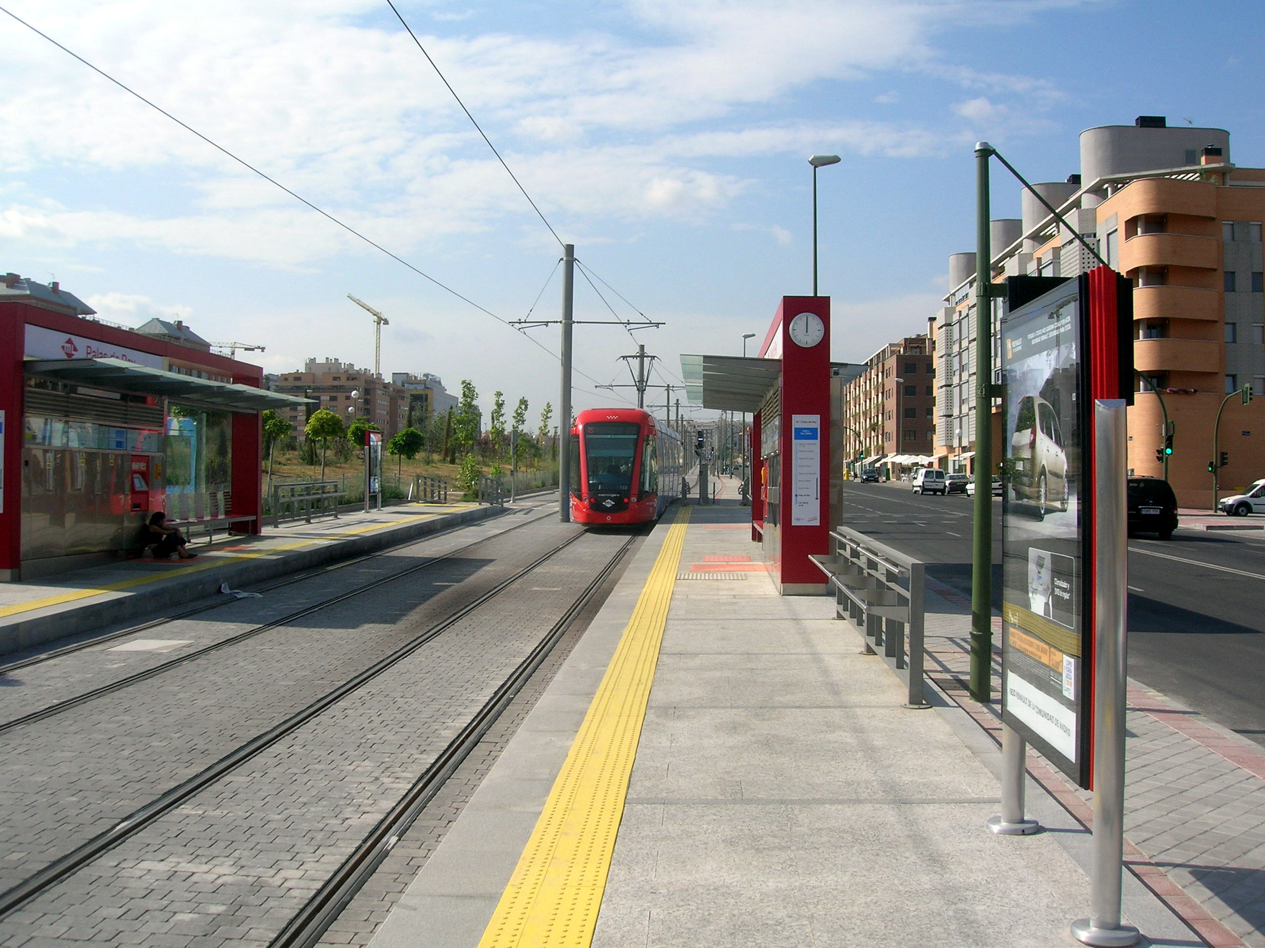 Metro Ligero Linea 1